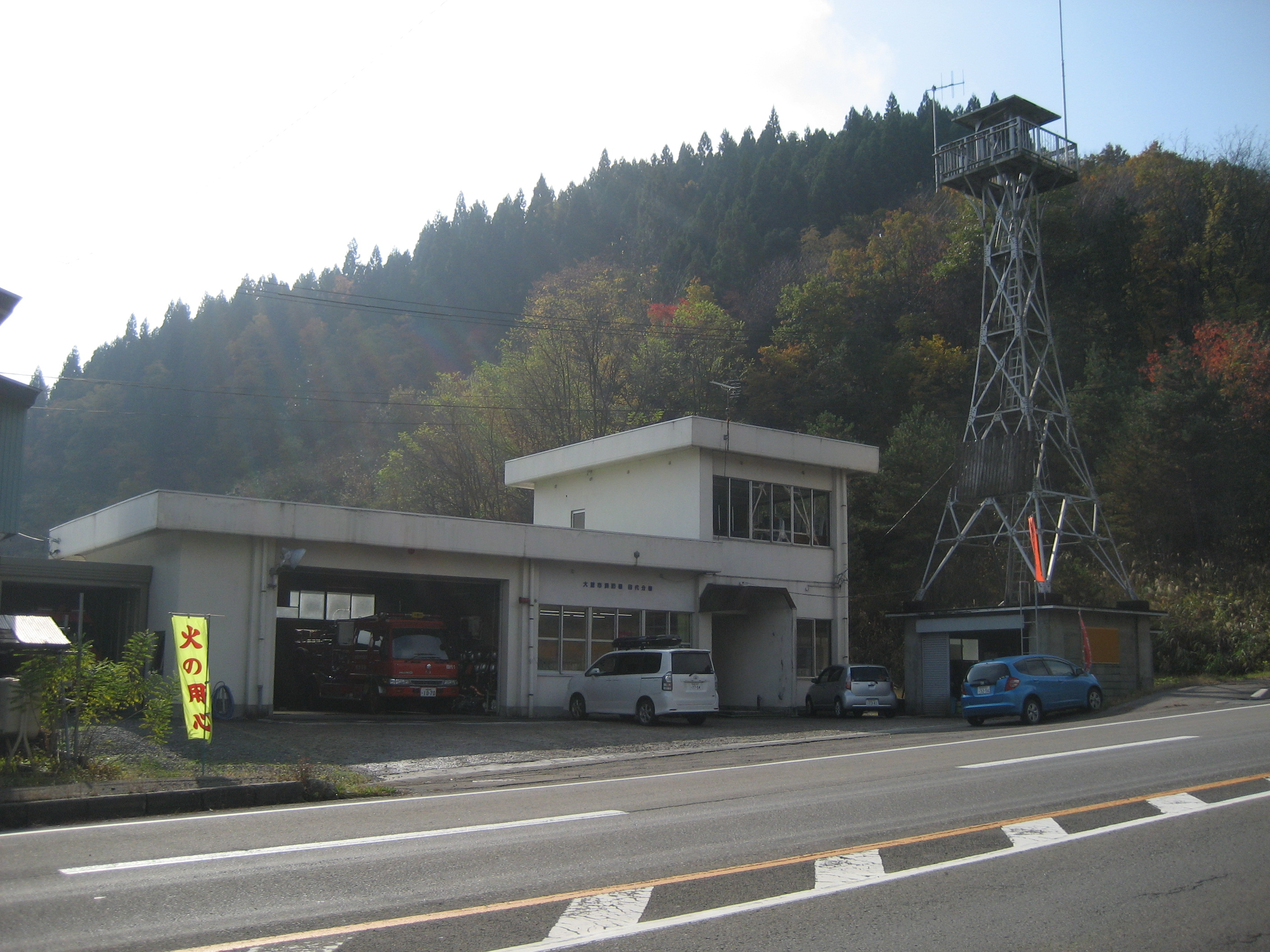 大館市消防署田代分署庁舎